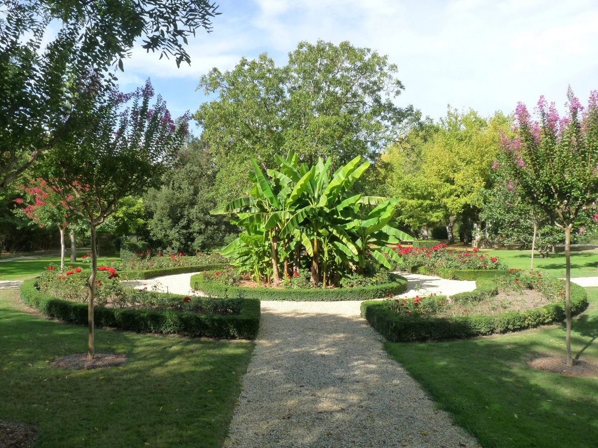 Parc du château de Beaulon, St-Dizant-du-Gua, Charente-Maritime, France. Bananier